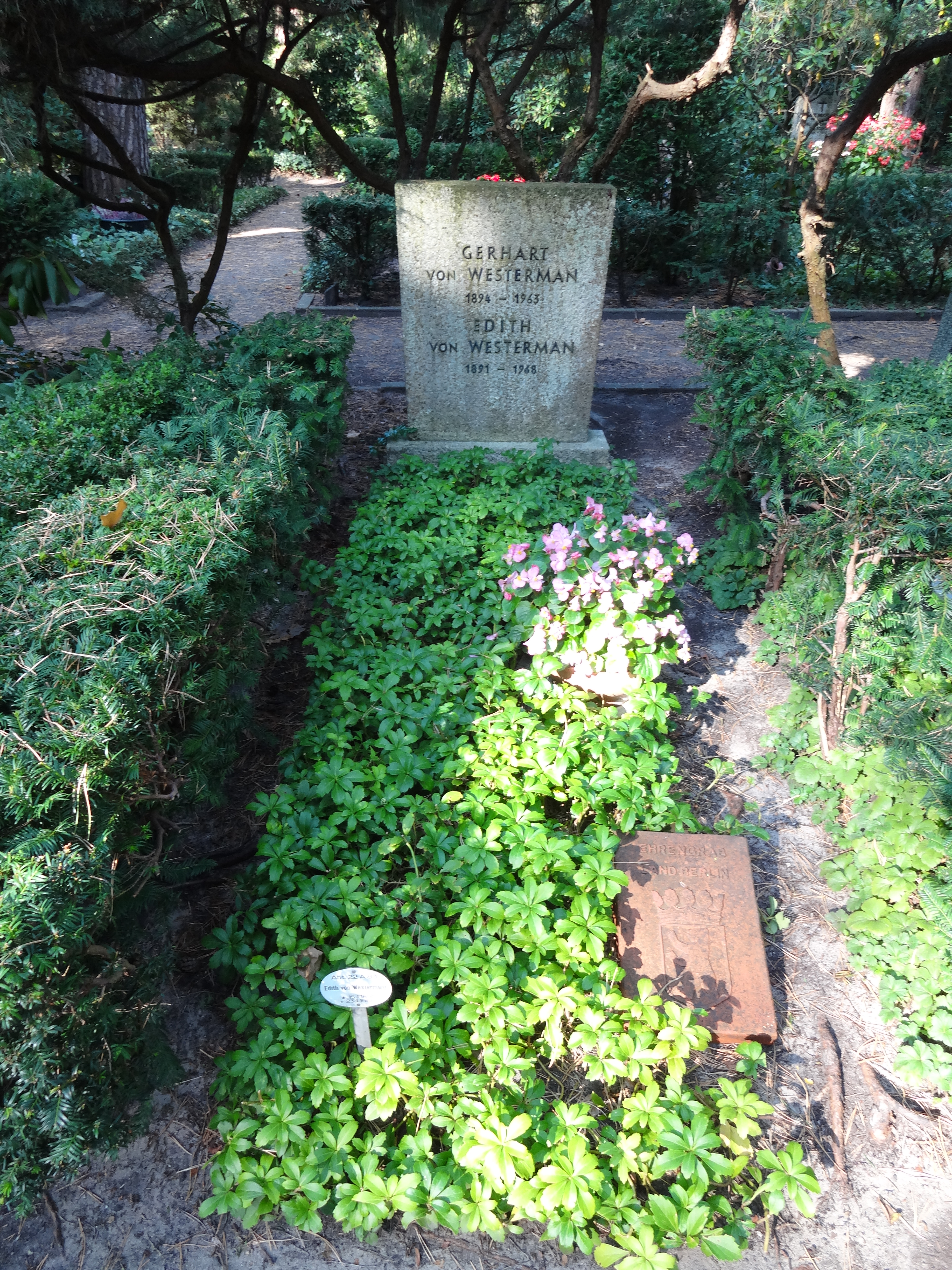 Ehrengrab für Westerman, Gerhart von auf dem Waldfriedhof Dahlem; der Friedhof ist ein Gartendenkmal in BerlinThis is a photograph of an architectural monument.